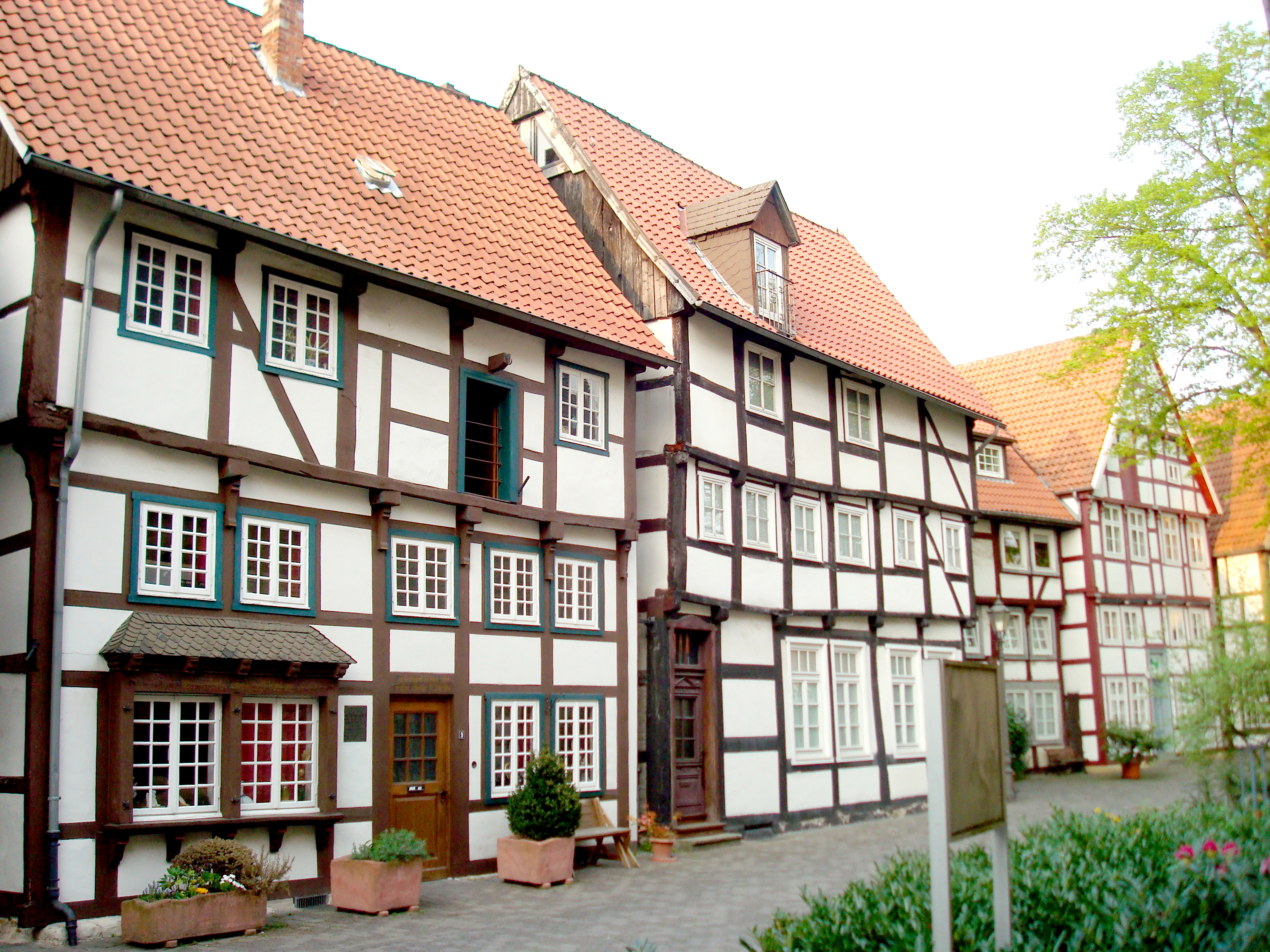 Am Alten Kirchplat in Gütersloh